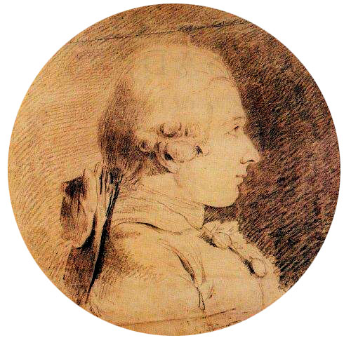 Ο Μαρκήσιος ντε Σαντ σε νεανική ηλικία, προσωπογραφία